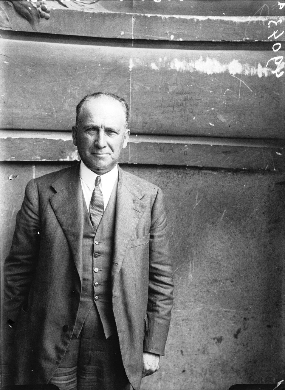 Francis Caballero, chef de la délégation espagnole (titre original)